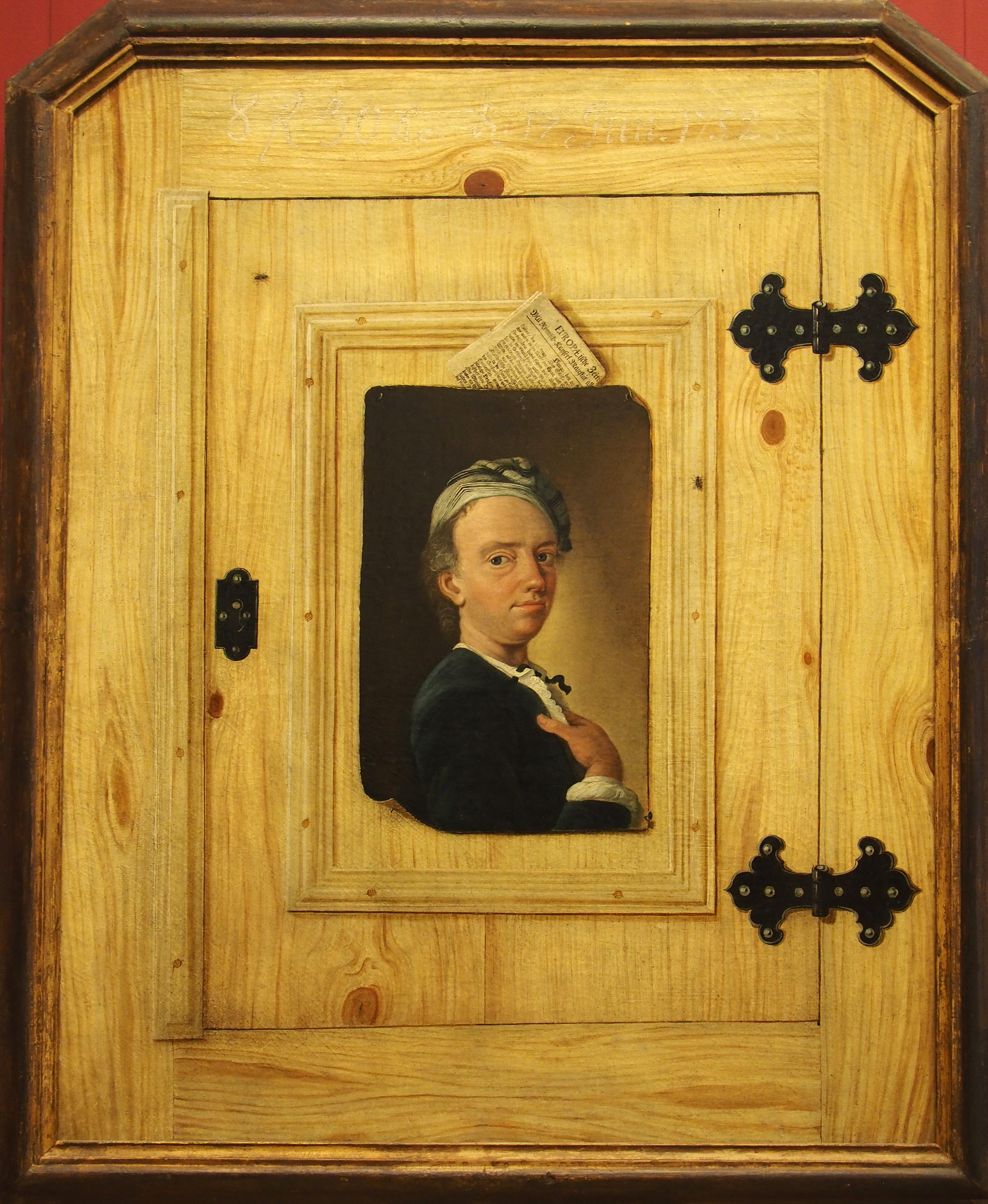 Die Schrift auf der gemalten Holztür „8 f 30 Kr. d. 17. Jun. 1732“ wird als Zechschuld gedeutet